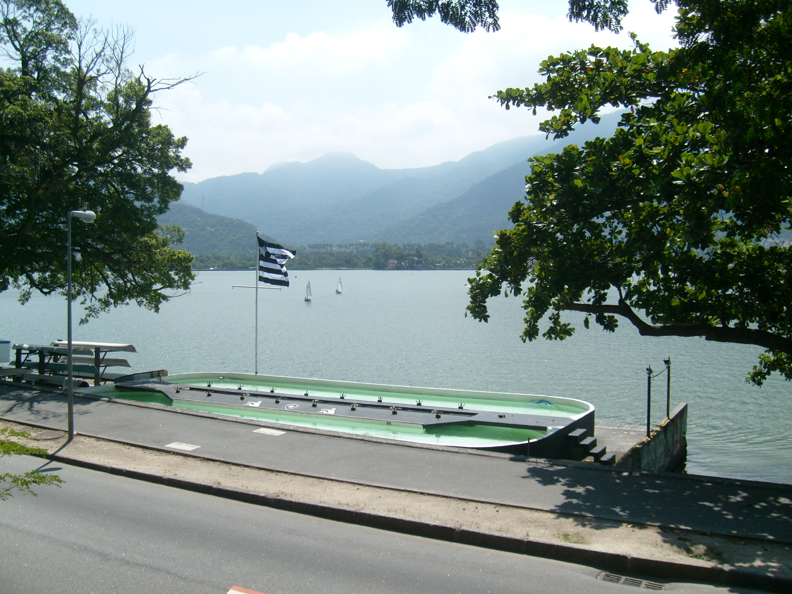 Sede de remo do Botafogo de Futebol e Regatas na Lagoa Rodrigo de Freitas, em 2009.